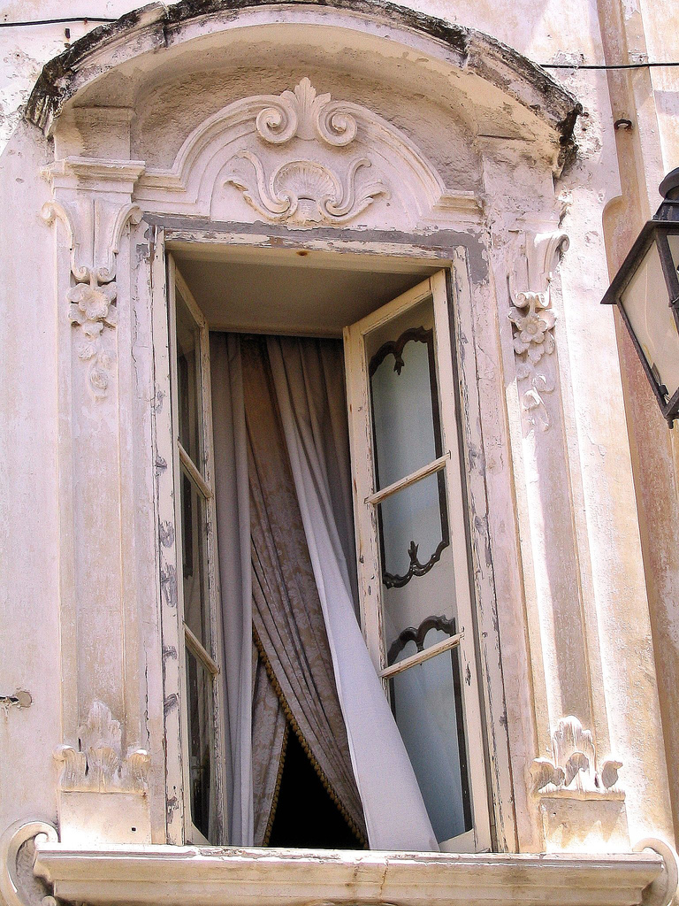 Gallipoli, Puglia, Italia